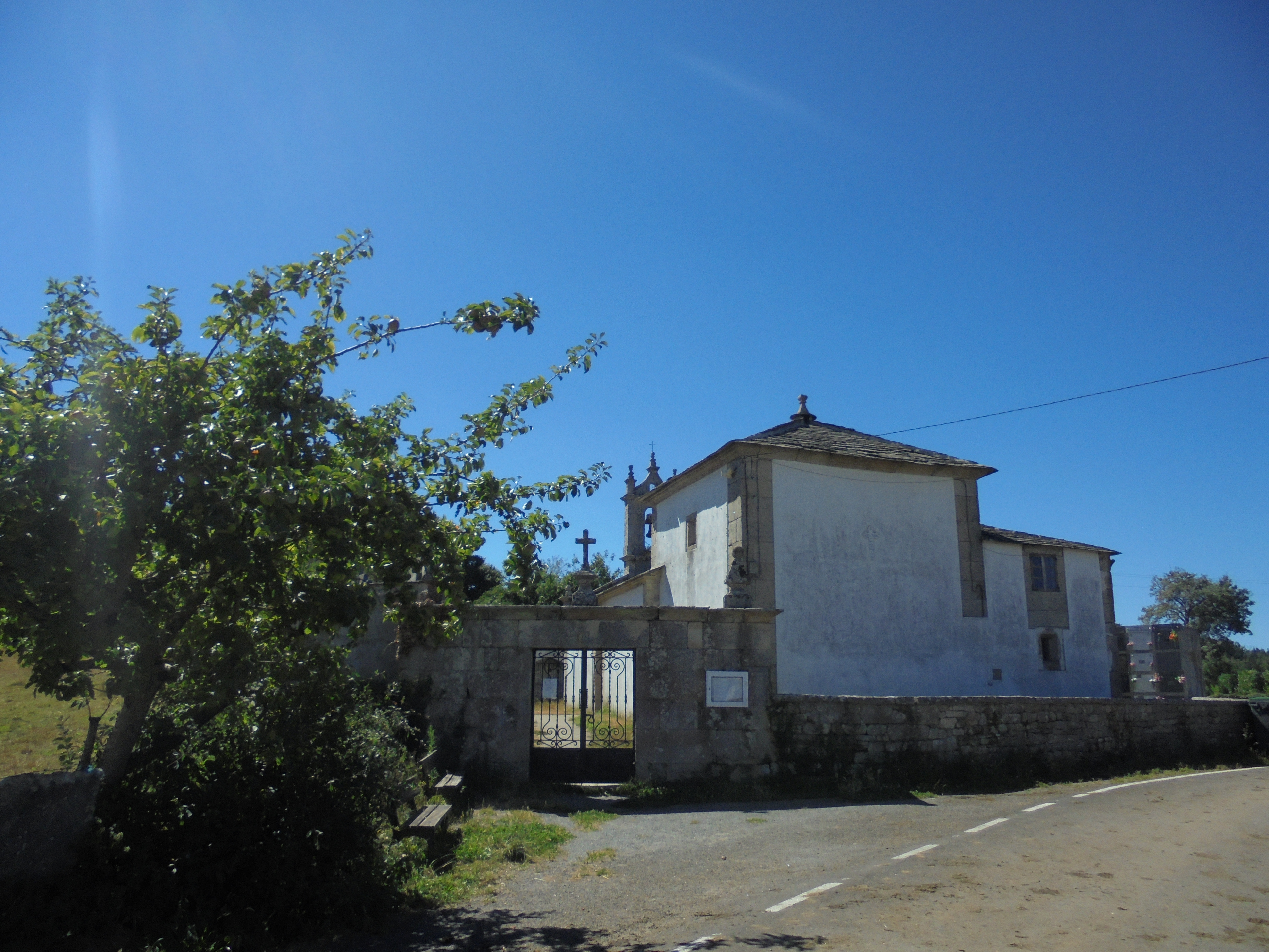 Igrexa parroquial de San Pedro de Calde ( Lugo)